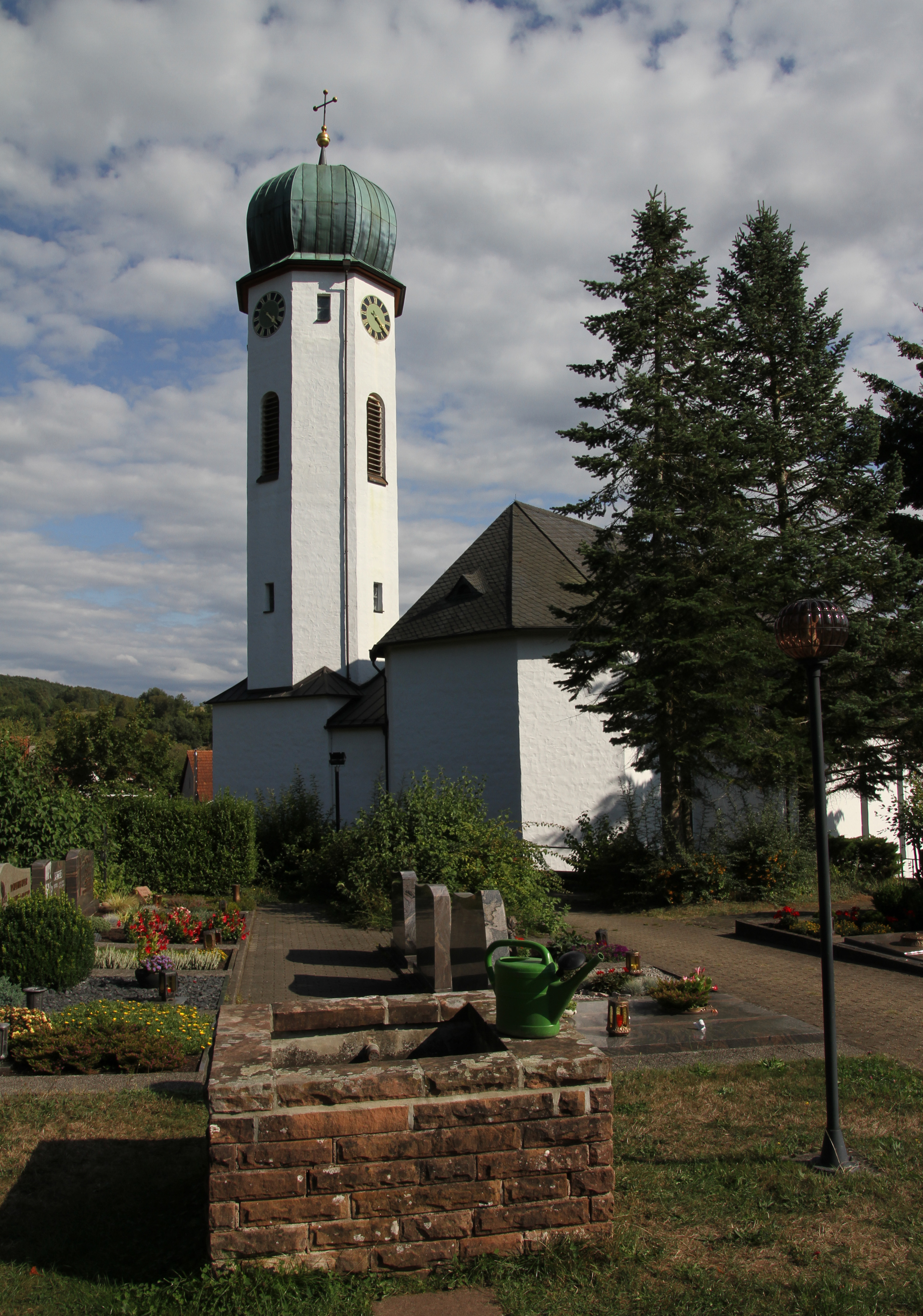 Busenberg, Kirchstraße 1; katholische Kirche St. Jacobus; barocker Saalbau, 1760–67, einbezogen in den Neubau von 1927–29.